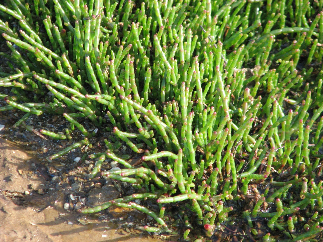 Sarcocornia quinqueflora Ricketts Point, Victoria, Australia